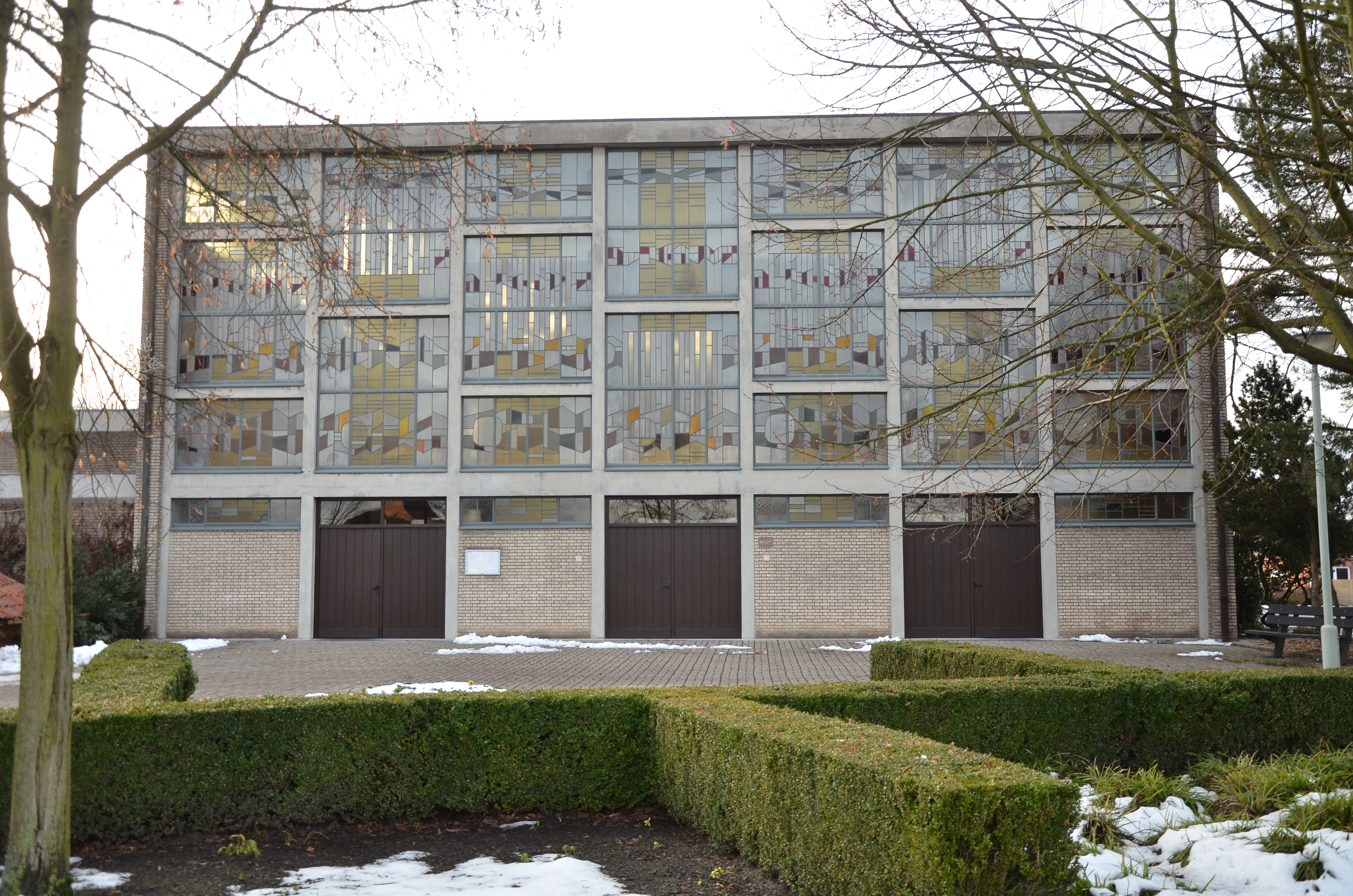 Parochiekerk Onze-Lieve-Vrouw Altijddurende Bijstand